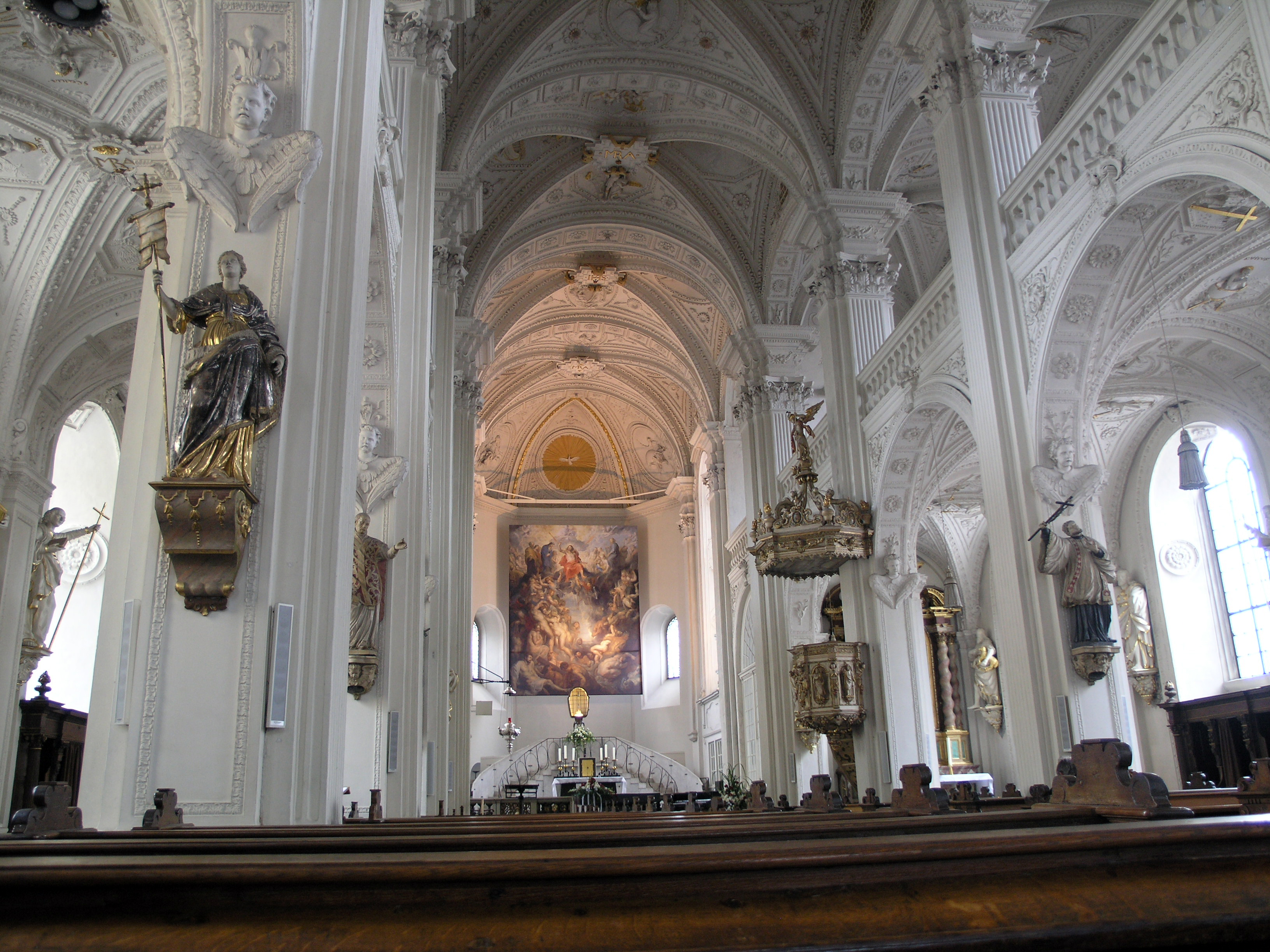 Северный Рейн - Вестфалия, Дюссельдорф - церковь Апостола Андрея